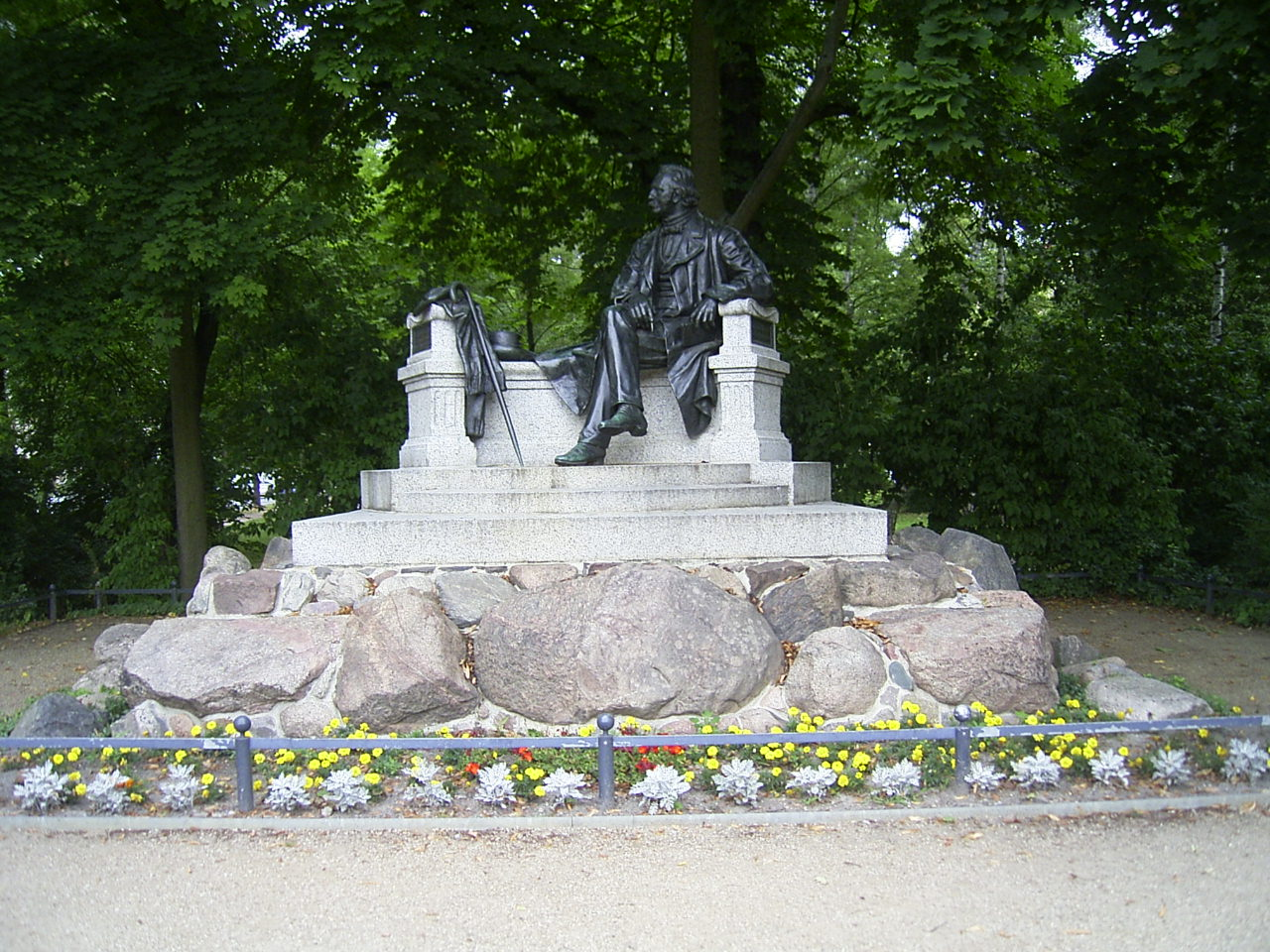 Fontanedenkmal in Neuruppin